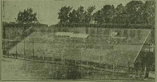 Tribuna este del estadio de Unión de Santa Fe en 1954